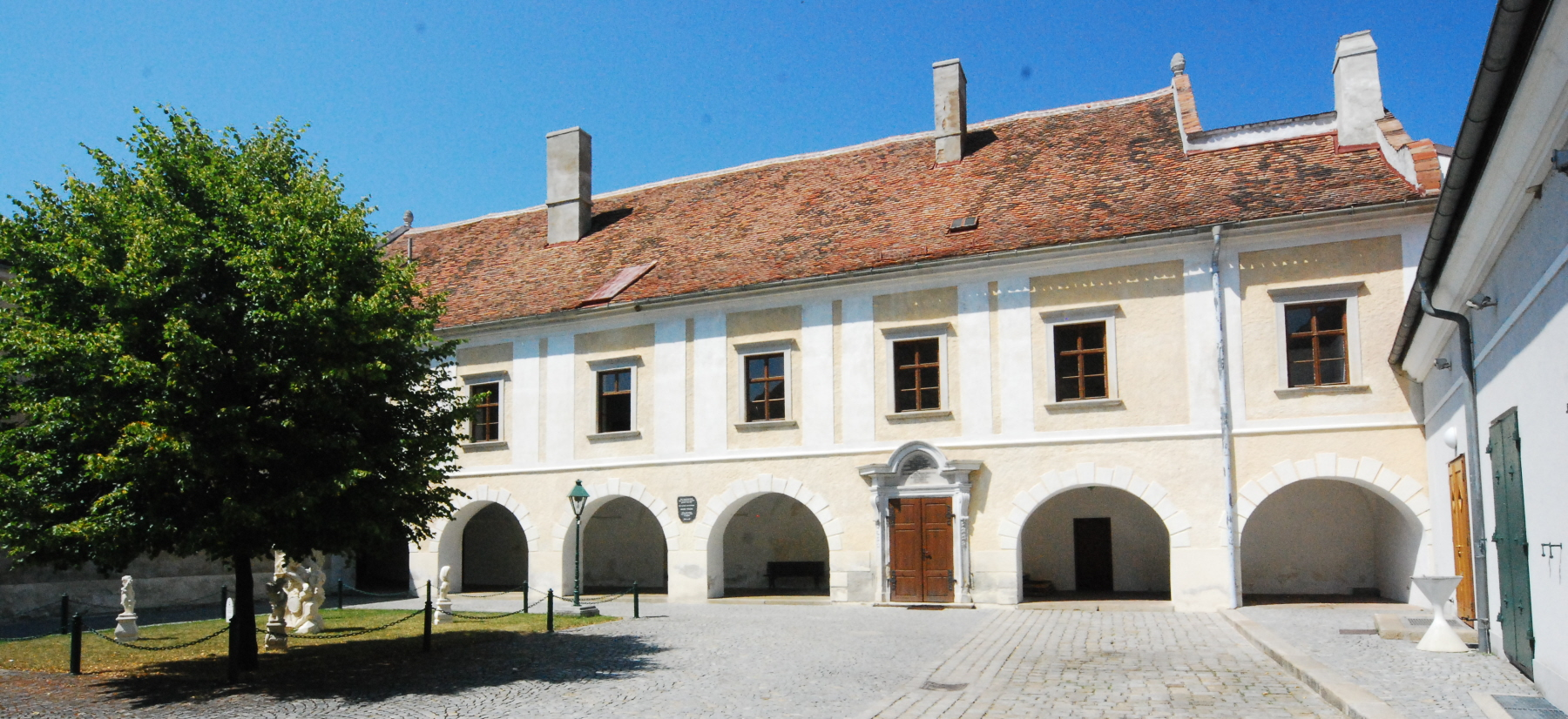 Hofseite des Pöltingerhofs in Pulkau in Niederösterreich